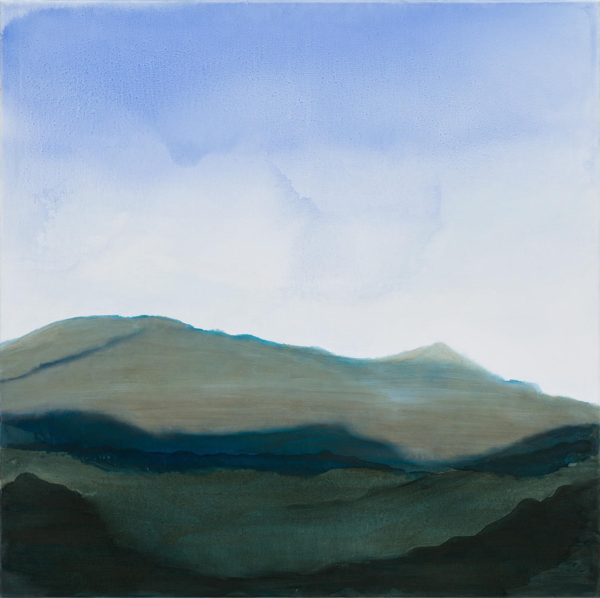 Kontra Ágnes: Himalája térképek 1. című festménye